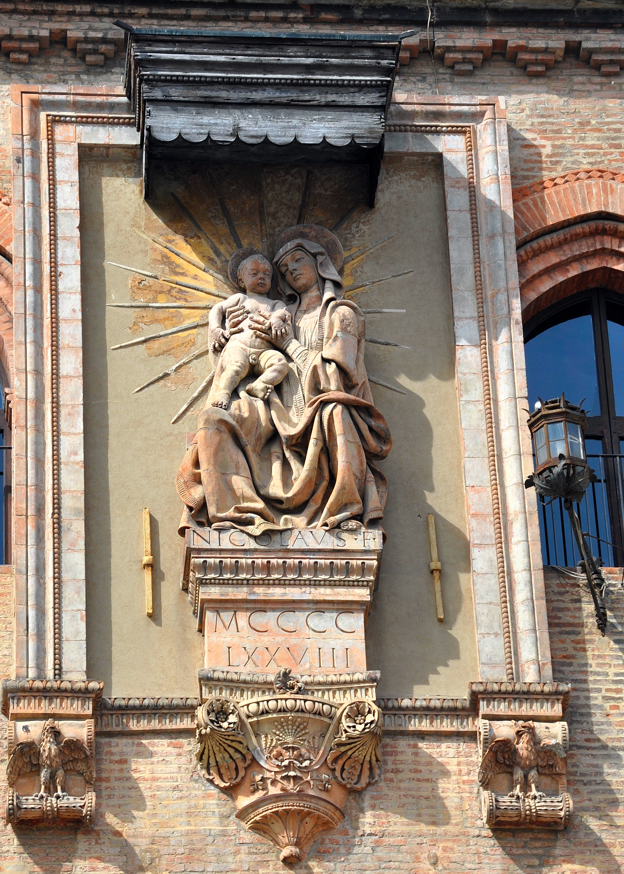 Palazzo del Comune This is a photo of a monument which is part of cultural heritage of Italy.